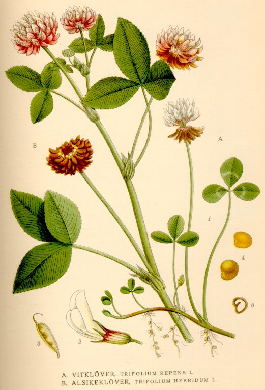 Vitklöver och Alsikeklöver